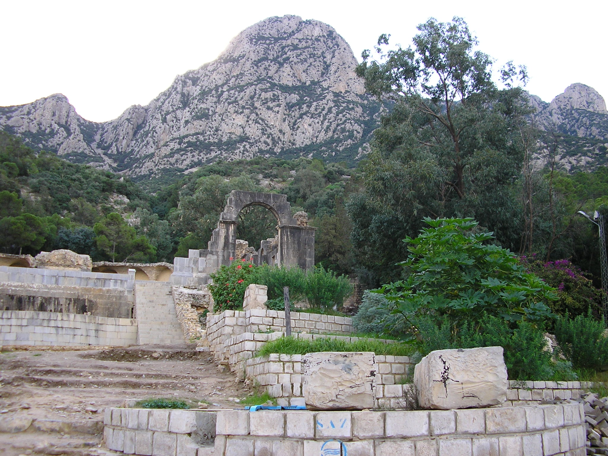 Photo personnelle prise en déc 2004 ; représentant le temple de l'eau adossé au djebel Zaghouan.